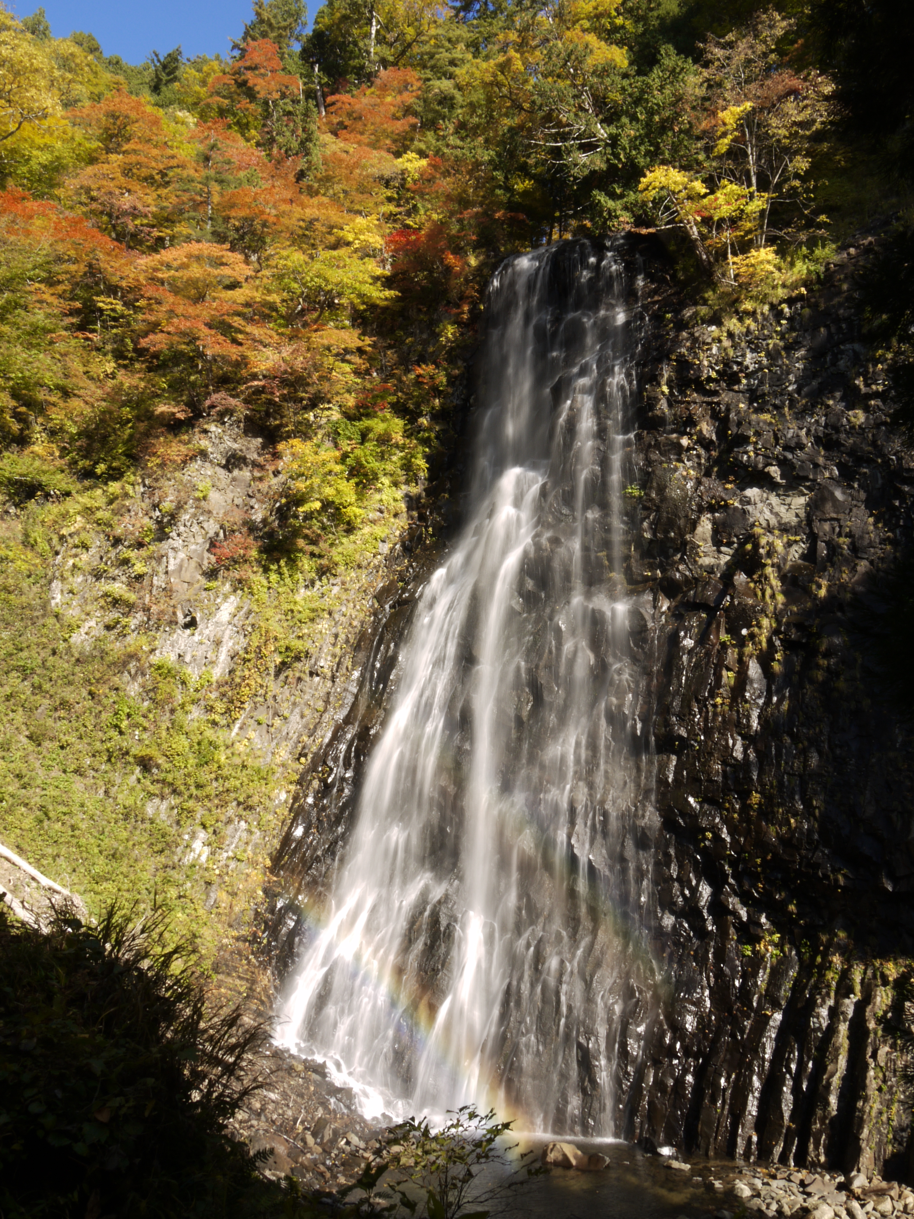 一ノ滝 立又渓谷（秋田県）